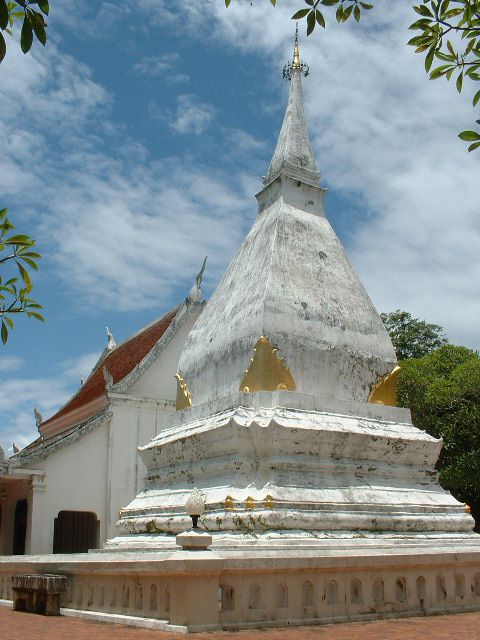 Phra That Si Song Rak (วัดพระธาตุศรีสองรัก), Loei, Thailand.